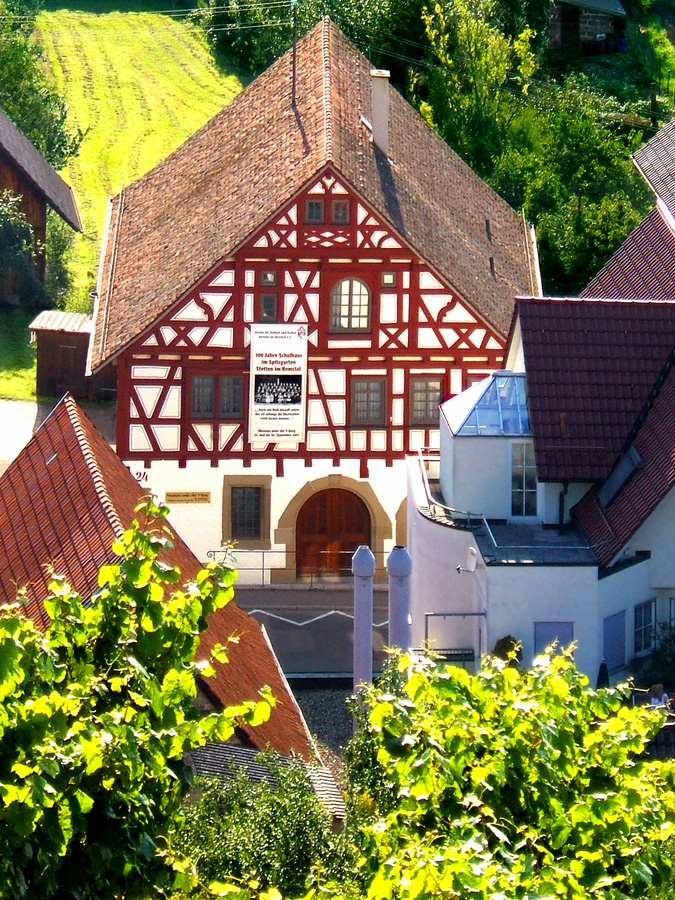 Museum_unter_der_Y-Burg in Kernen-Stetten, Deutschland, von der Y-Burg aus gesehen